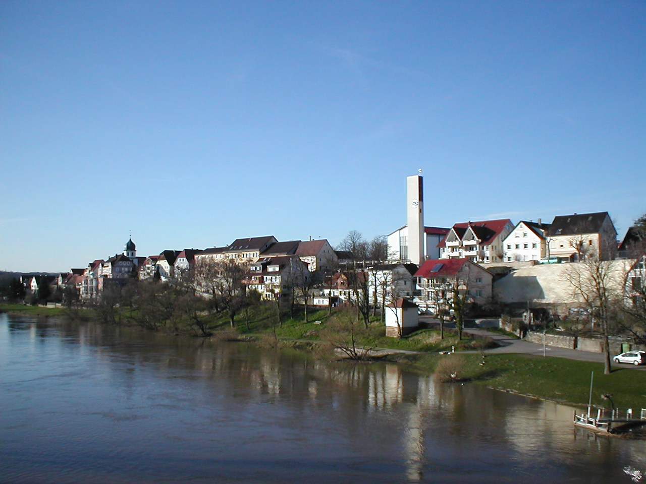 Ortsansicht von Jagstfeld vom Neckarufer aus